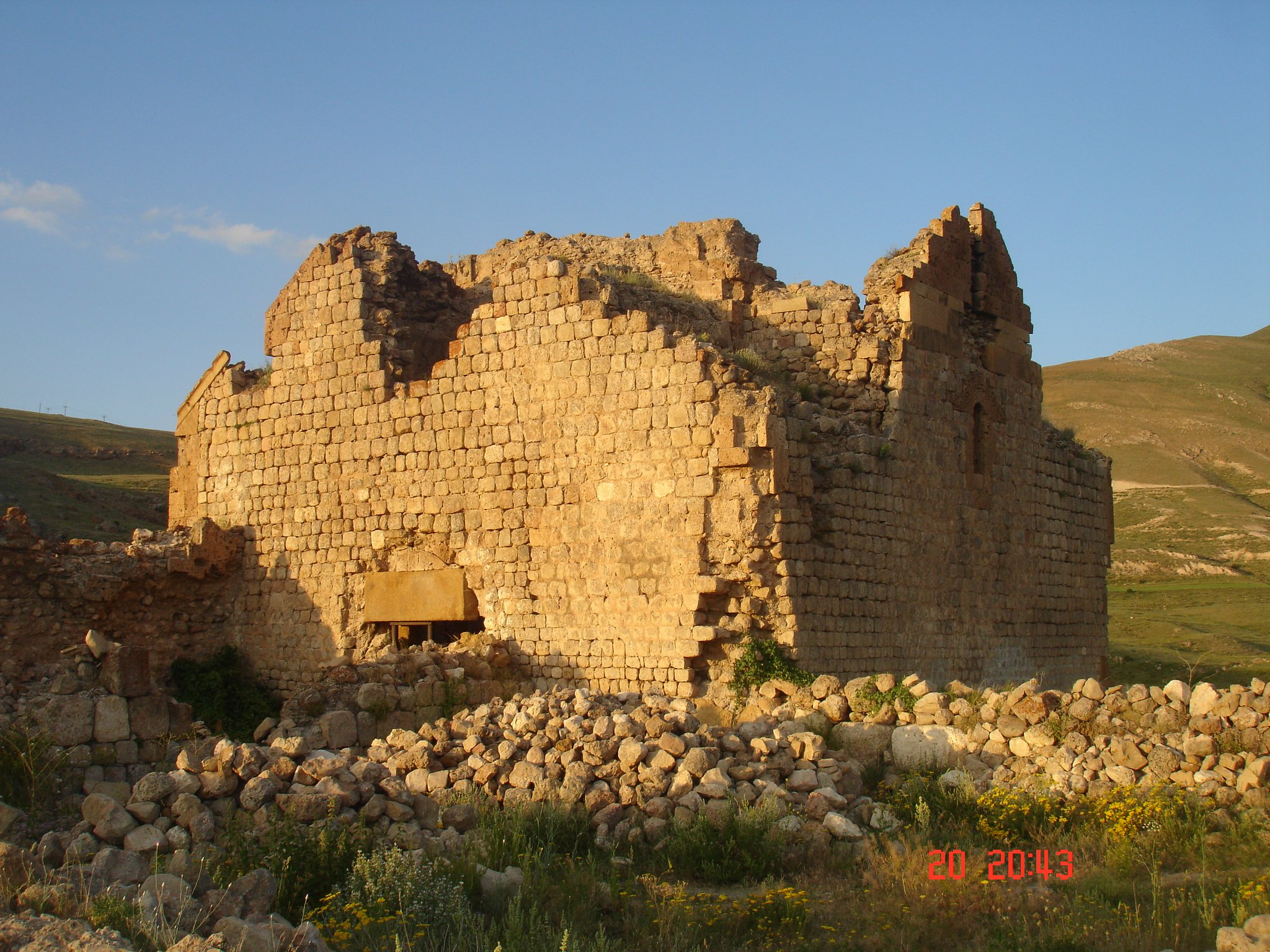 Քարակոփ վանքի պատկերը նախքան վերականգնումը